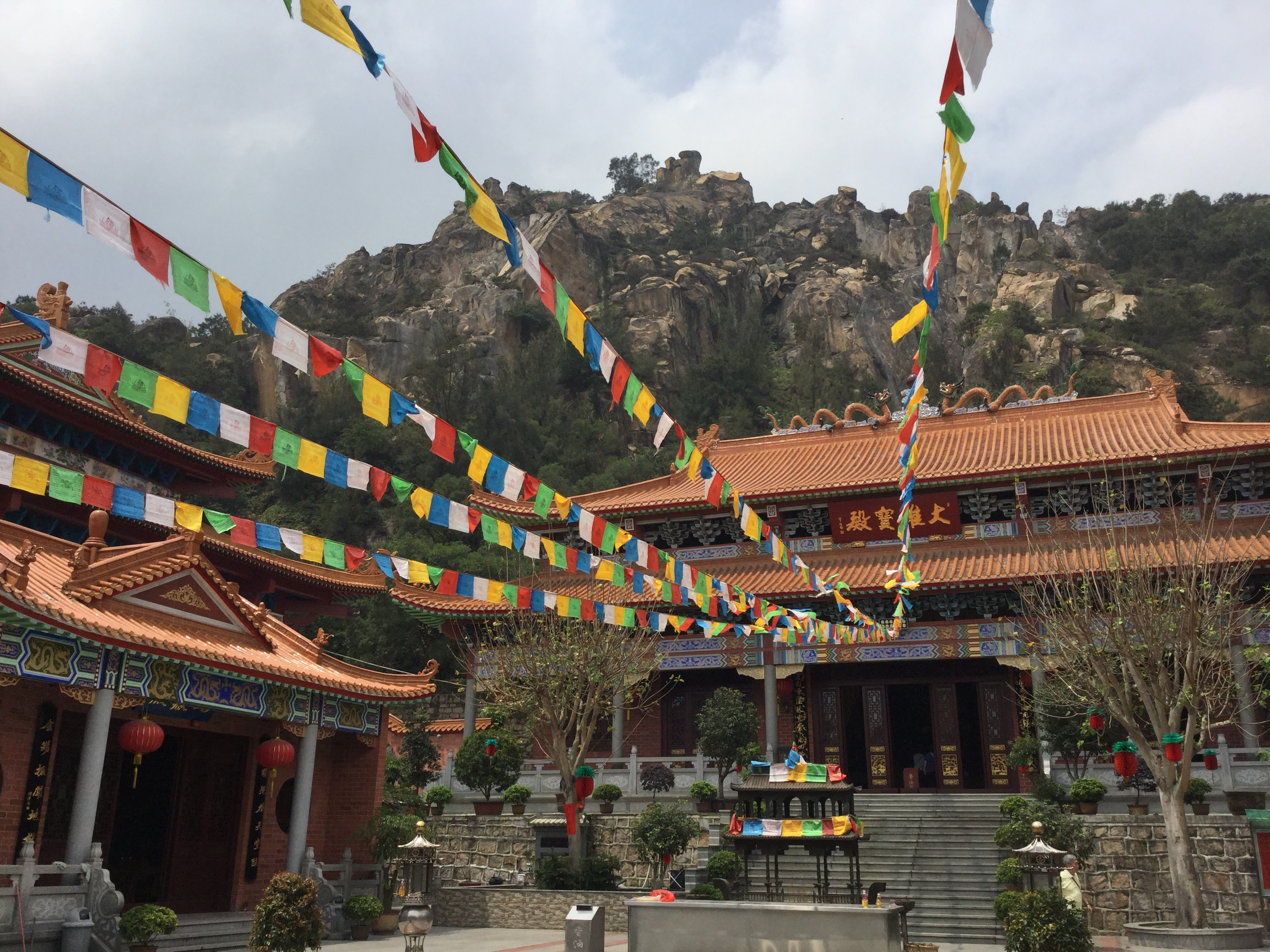 大雄宝殿，汕头天坛花园